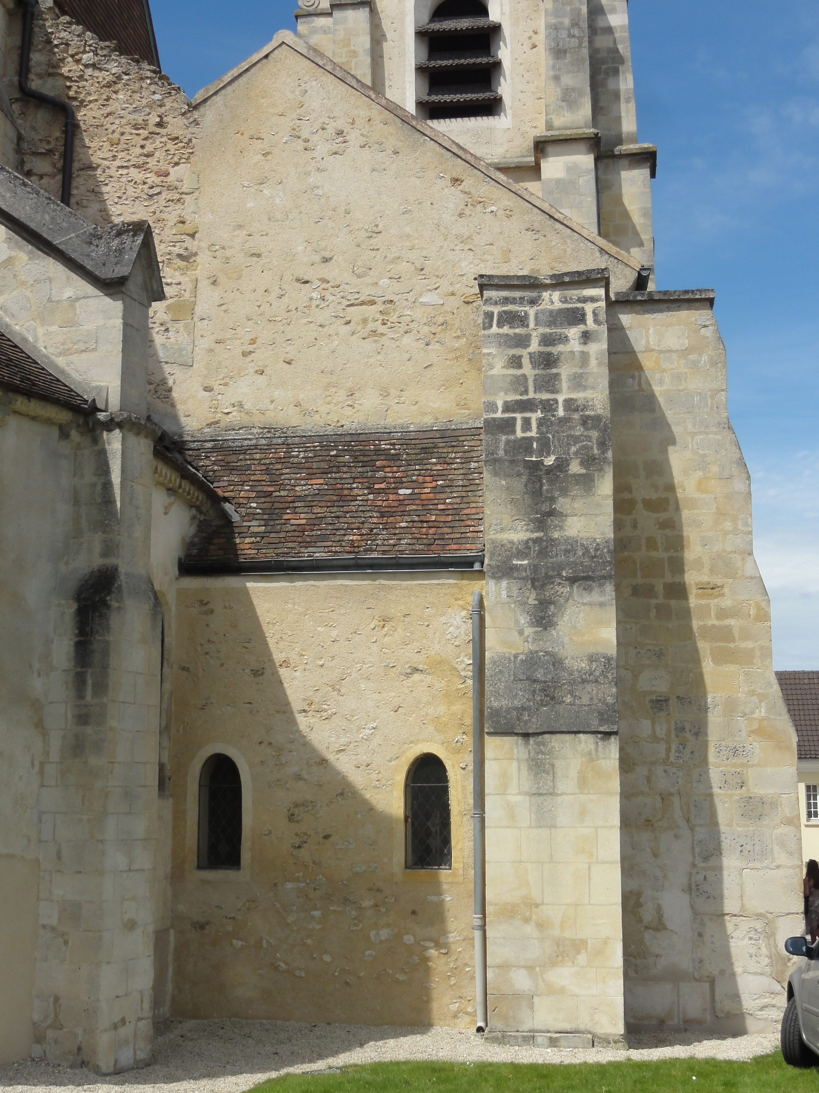 Croisillon nord (remanié), côté est.